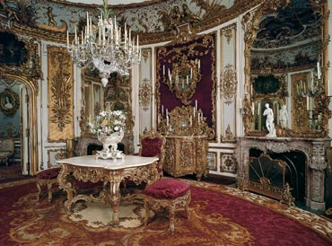 [Photo personnelle-] Interieur de la salle a manger On remarque que cette table avait une proprièté " magique". C'etait une grande invention pour l'epoque: Il y avait des systemes de poulis qui permettaient de faire monter et descendre la table pour ne pas que Louis II ne voit ses serviteurs car ils aimait la solitude. Ainsi les plats remontaient sur la tables sans que Louis II n'ait pu voir quelqu'un.